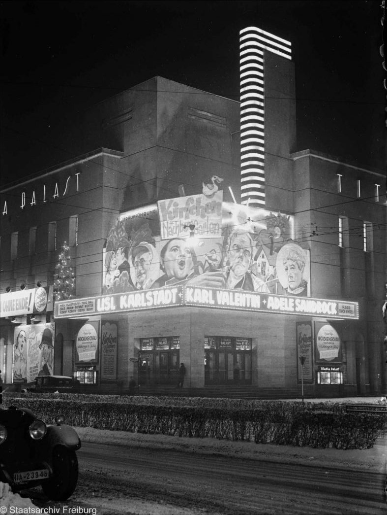 Berlin: Titania-Palast – Leuchtreklame bei Nacht und Schnee